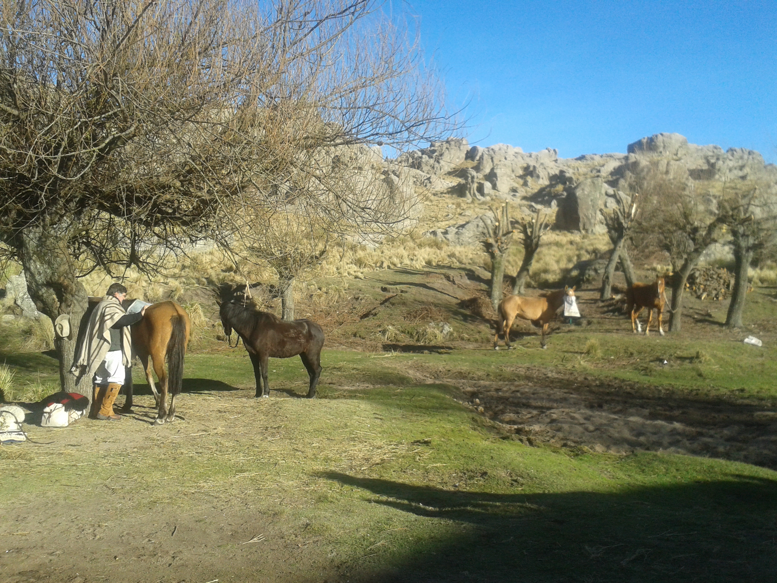 Pampa de Achala - Córdoba